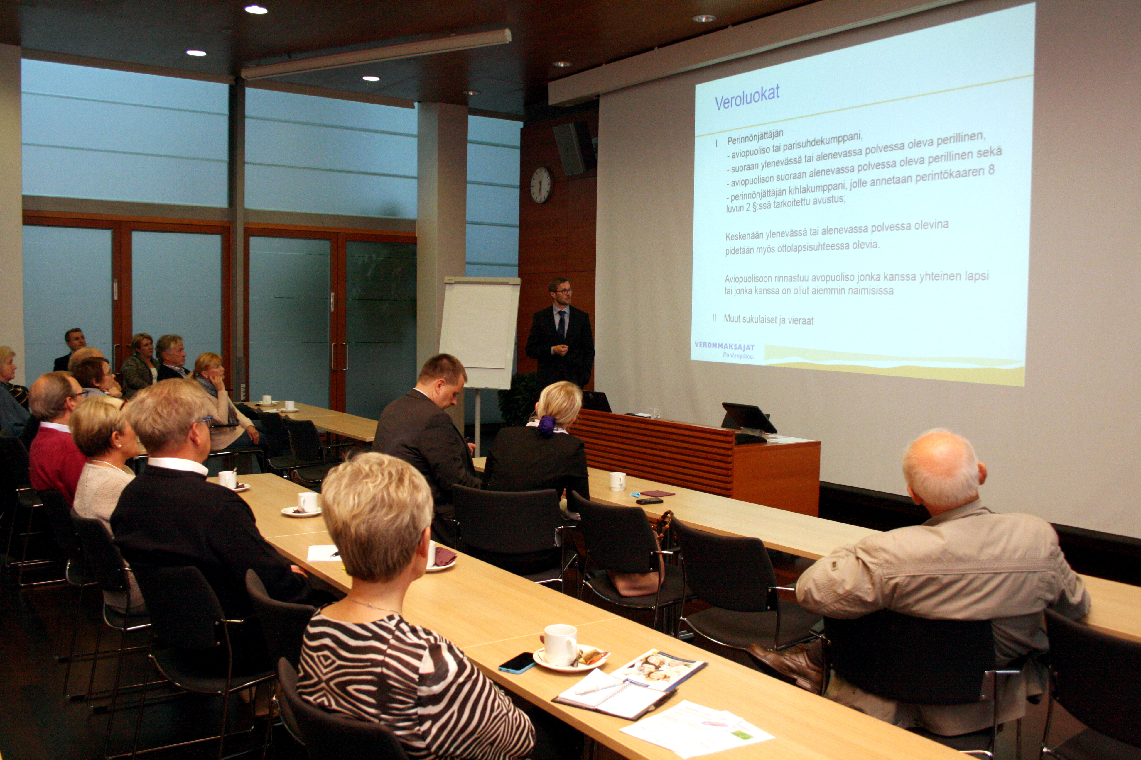 Veronmaksajain Keskusliiton lakimies pitämässä veroneuvontailtaa.